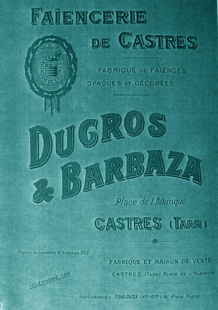 couverture de catalogue